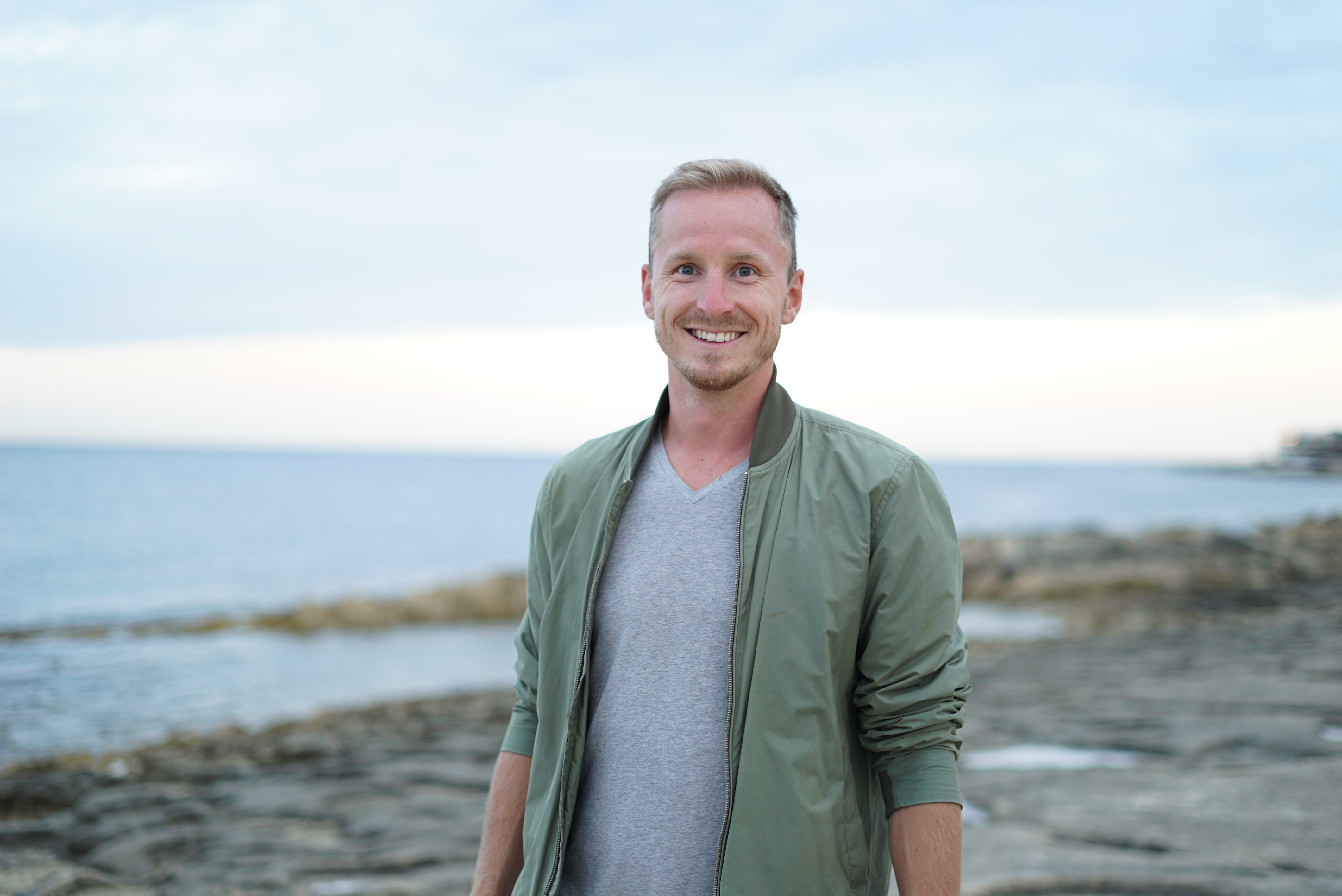 Erik Bergman på Malta